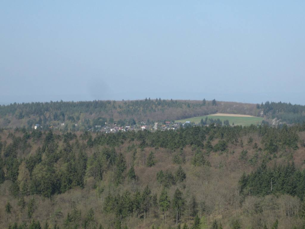 Blick vom Aussichtsturm auf dem Hausberg in Richtung Espa